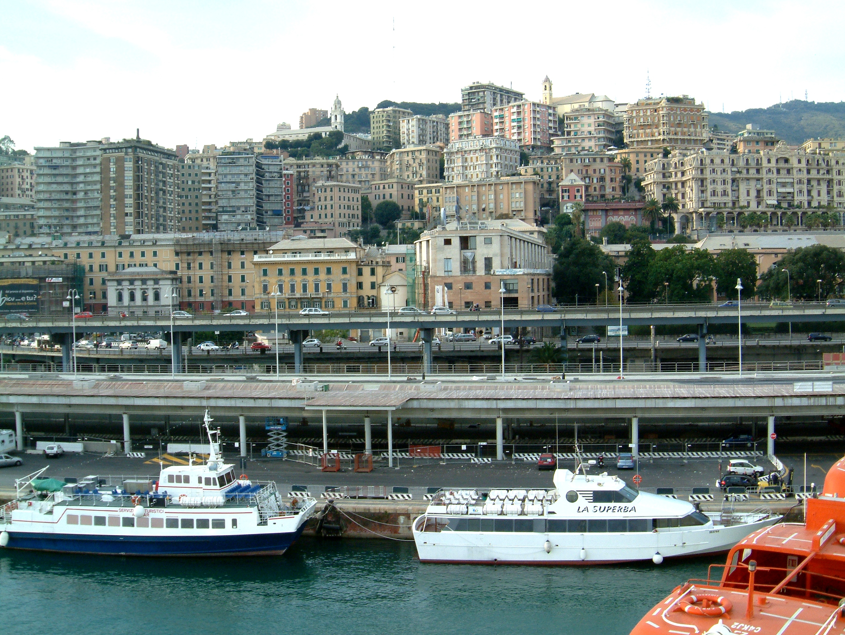 Genua, Blick_vom_Hafen_aus